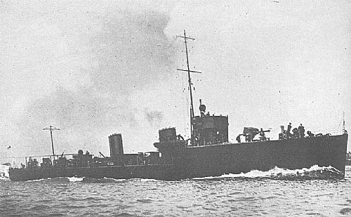 Der britische Zerstörer HMS ARDENT der Acasta-Klasse